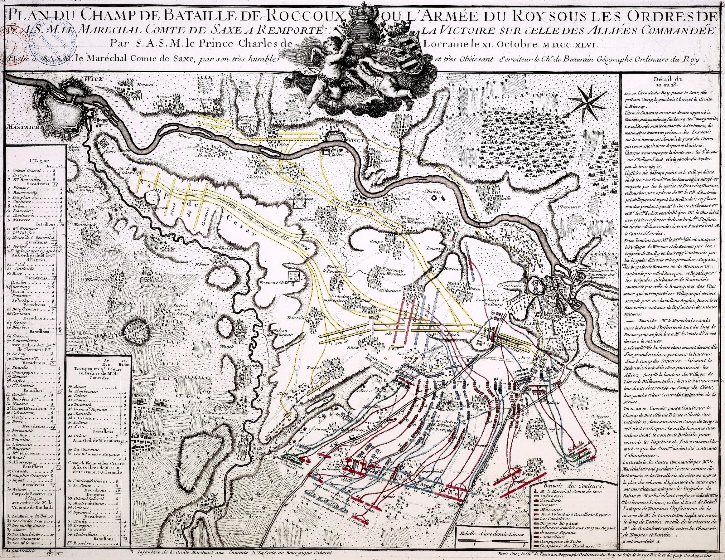 Plan du champ de bataille de Roccoux ou l'armée du roy sous les ordres de Sas M. le maréchal comte de Saxe a remporté la victoire sur celle des alliés commandée par Sas M. le prince Charles de Lorraine, le 11 octobre 1746 / par le Chr. de Beaurain